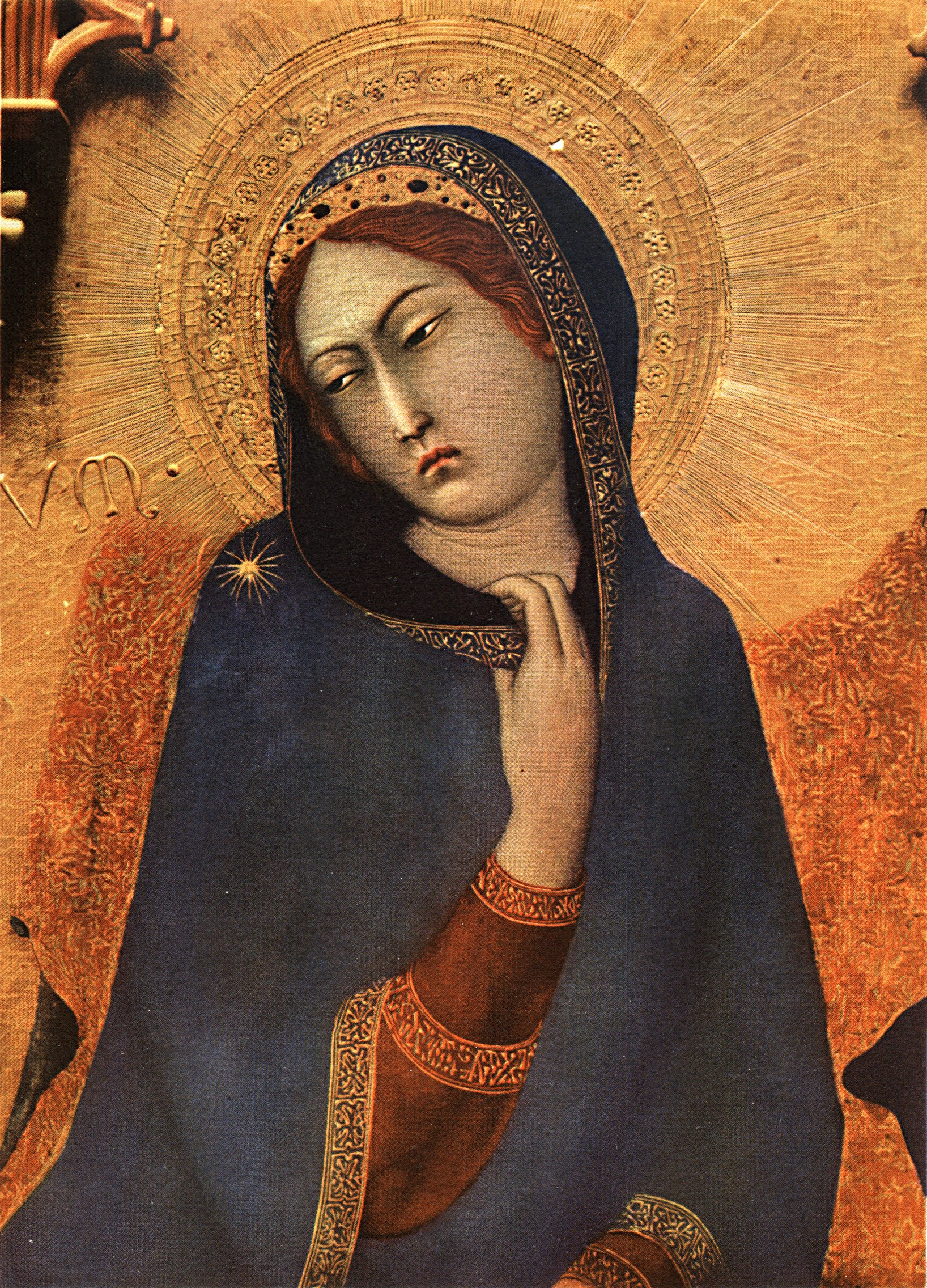 Madonna